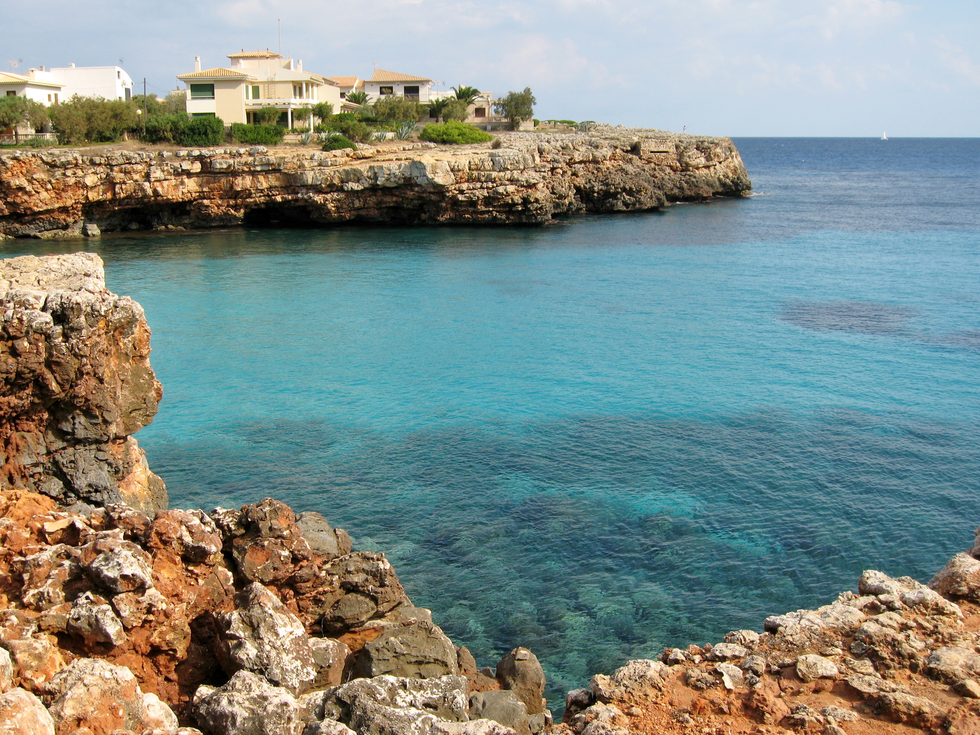 Cala Morlanda, Gemeinde Manacor, Mallorca, Spanien